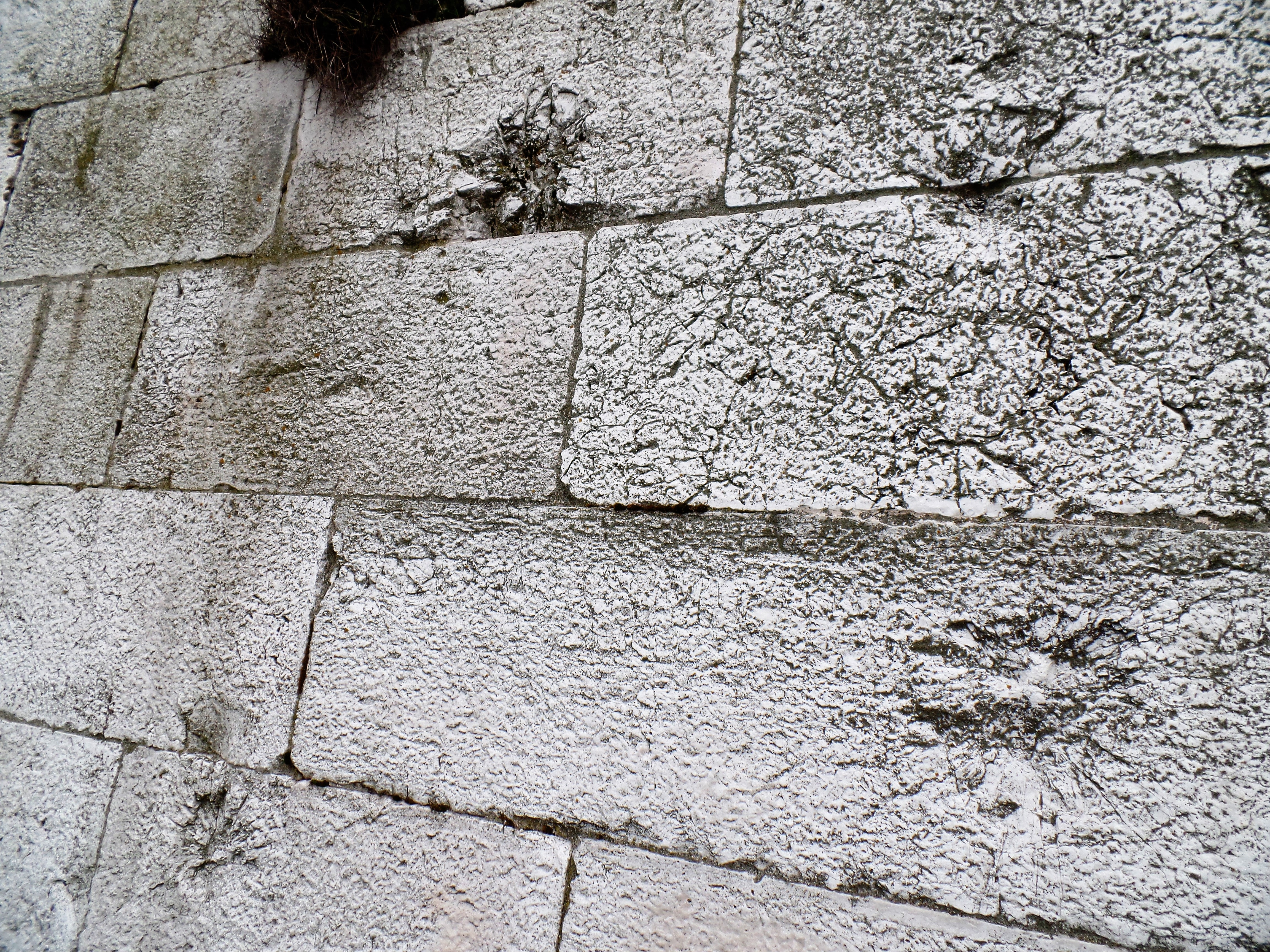 Lazzaretto AN - segni di 4 cannonate a palla